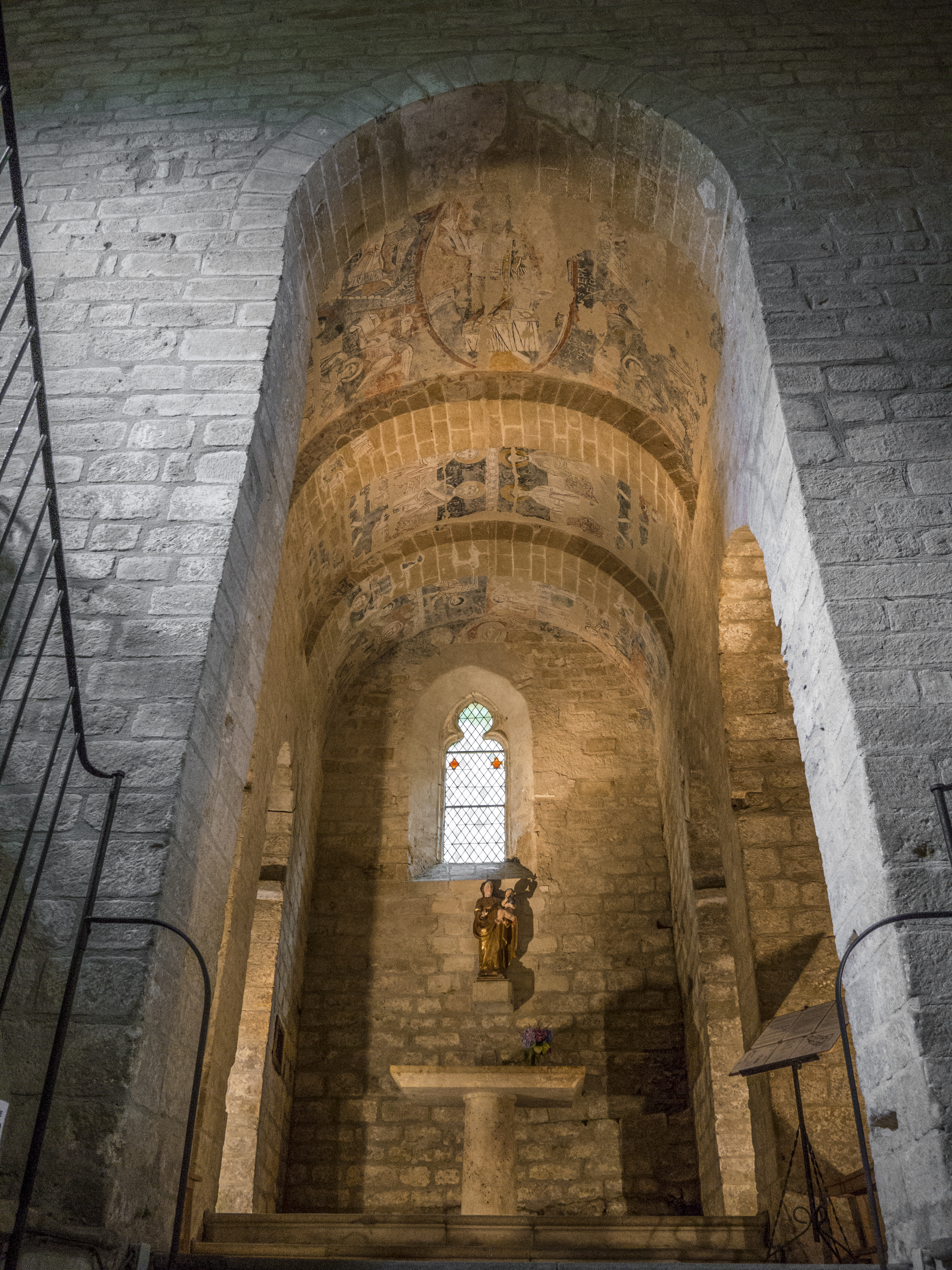 Abside du 2ème niveau construite au XIème siècle est ornée de peintures murales sur sa voûte réalisée au début du XIIème siècle. Les couleurs utilisées proviennent de terres naturelles, de bois ou d'os calcinés.